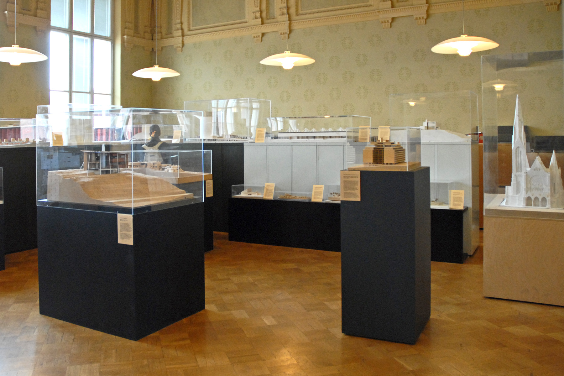 Salle d'exposition de maquettes d'architecture Le musée d'architecture, situé à proximité du musée du design, présente des expositions temporaires sur des réalisations architecturales en Finlande. Il dispose d'une importante bibliothèque, d'un centre d'archives et de maquettes de bâtiments.